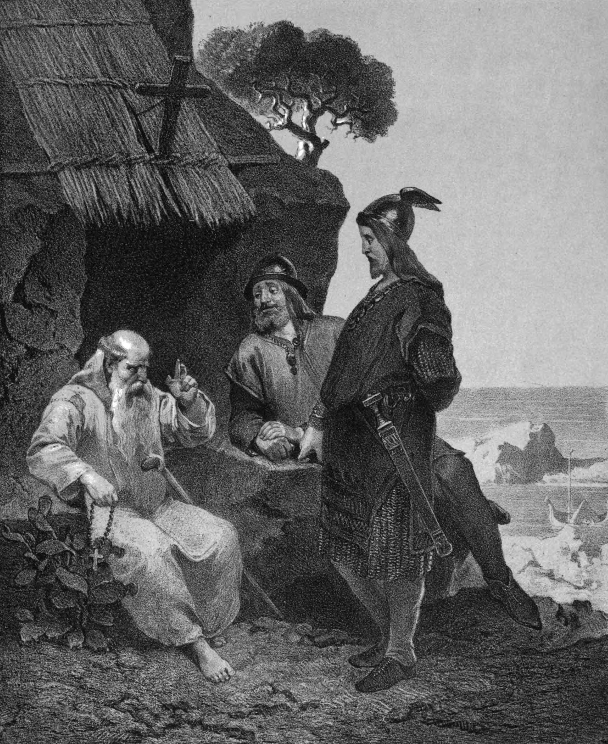 Olof Tryggvasons omvändelse till kristna lärantitle QS:P1476,sv:"Olof Tryggvasons omvändelse till kristna läran"